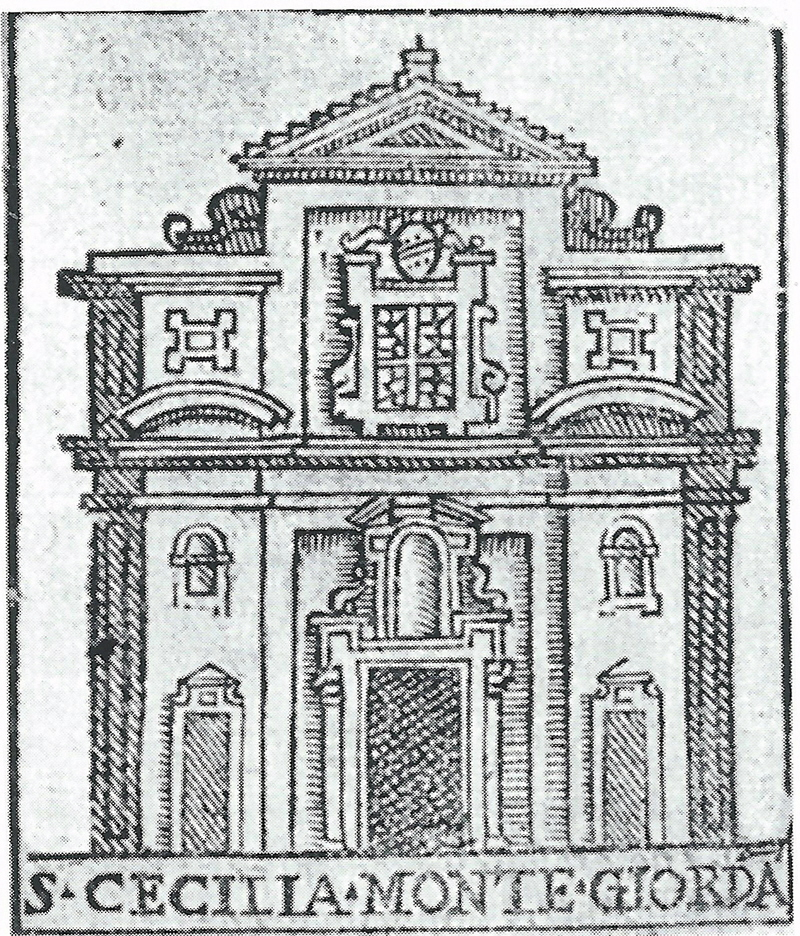 Stampa di Francino